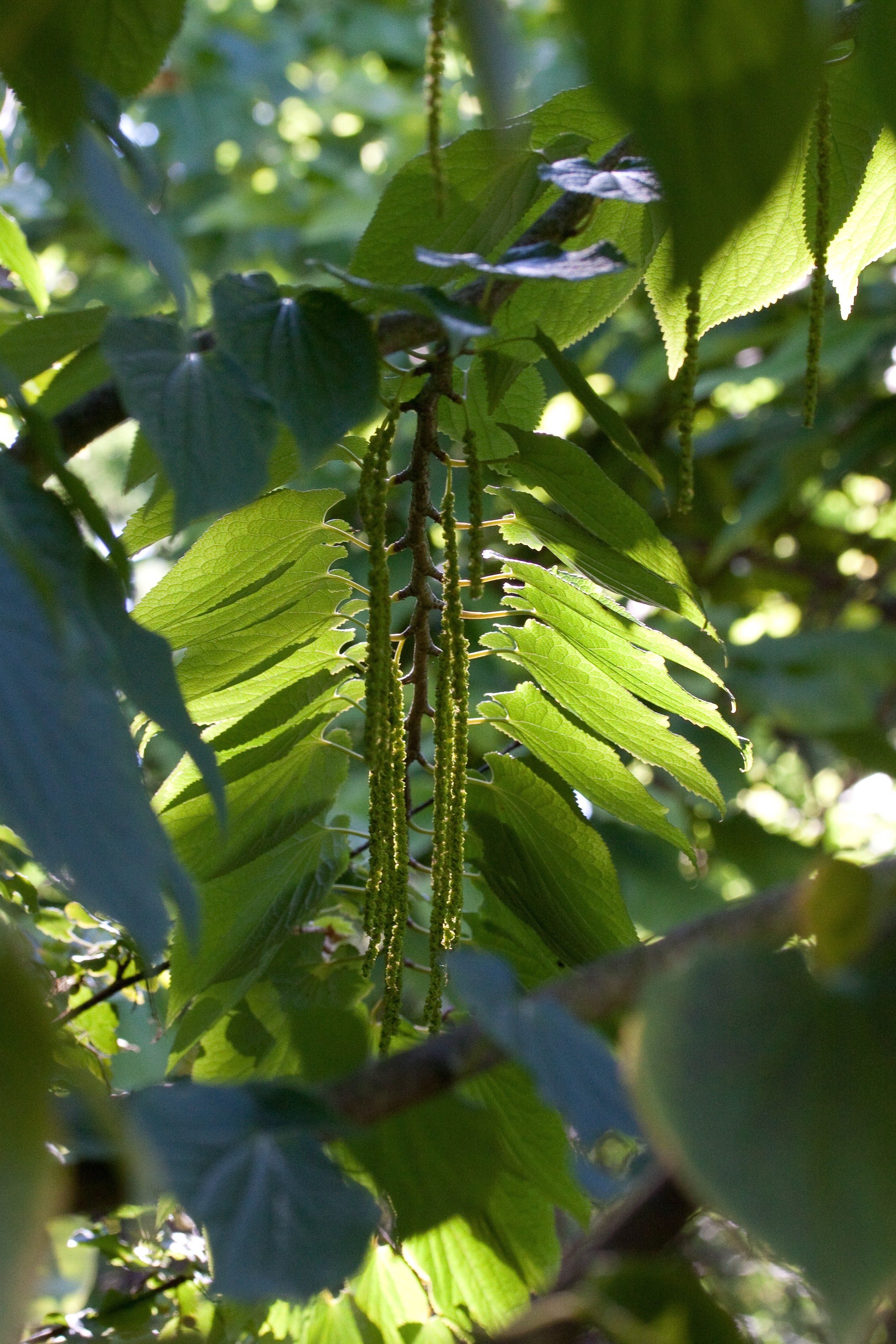 Tetracentron sinense - Feuilles et fleurs - Jardin botanique de Strasbourg - France